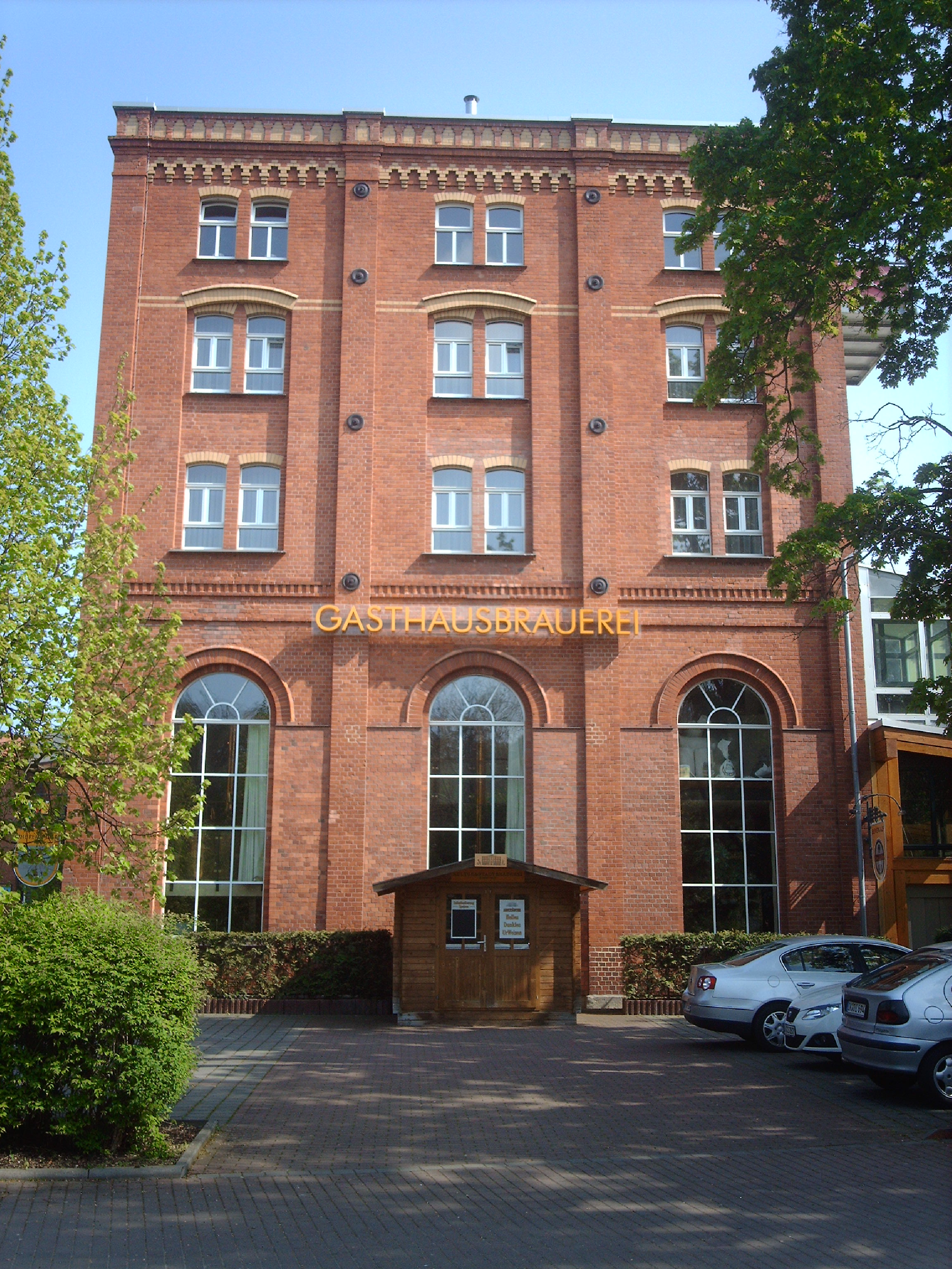 Stadtbrauerei Arnstadt (Brauhausstraße 1-3).